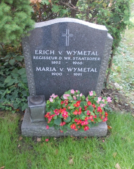 Erich von Wymetal (Feuerhalle Simmering (7-3-9-19)